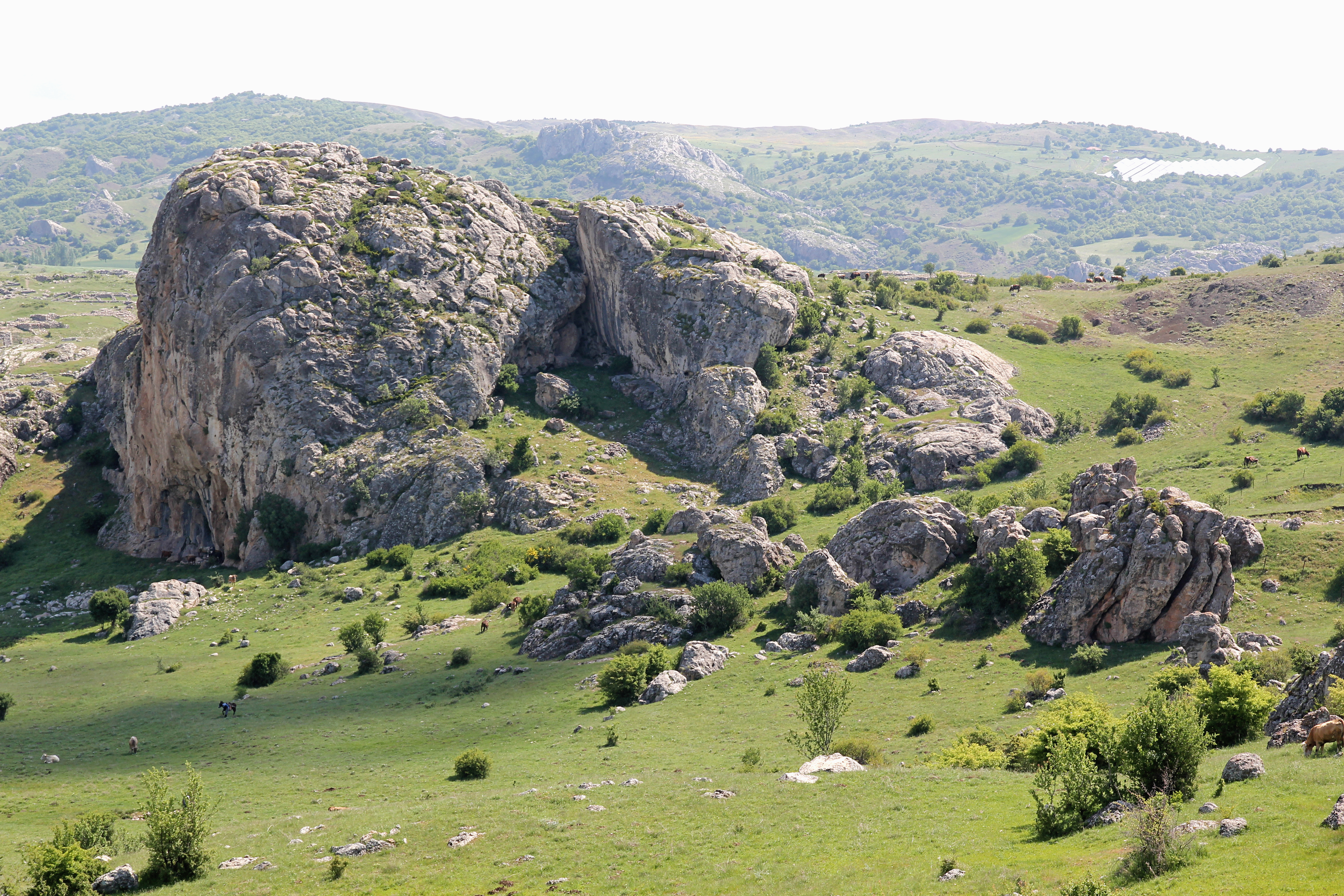 Ḫattuša, hethitische Hauptstadt bei Boğazkale, Zentraltürkei, Sarıkale von Süden